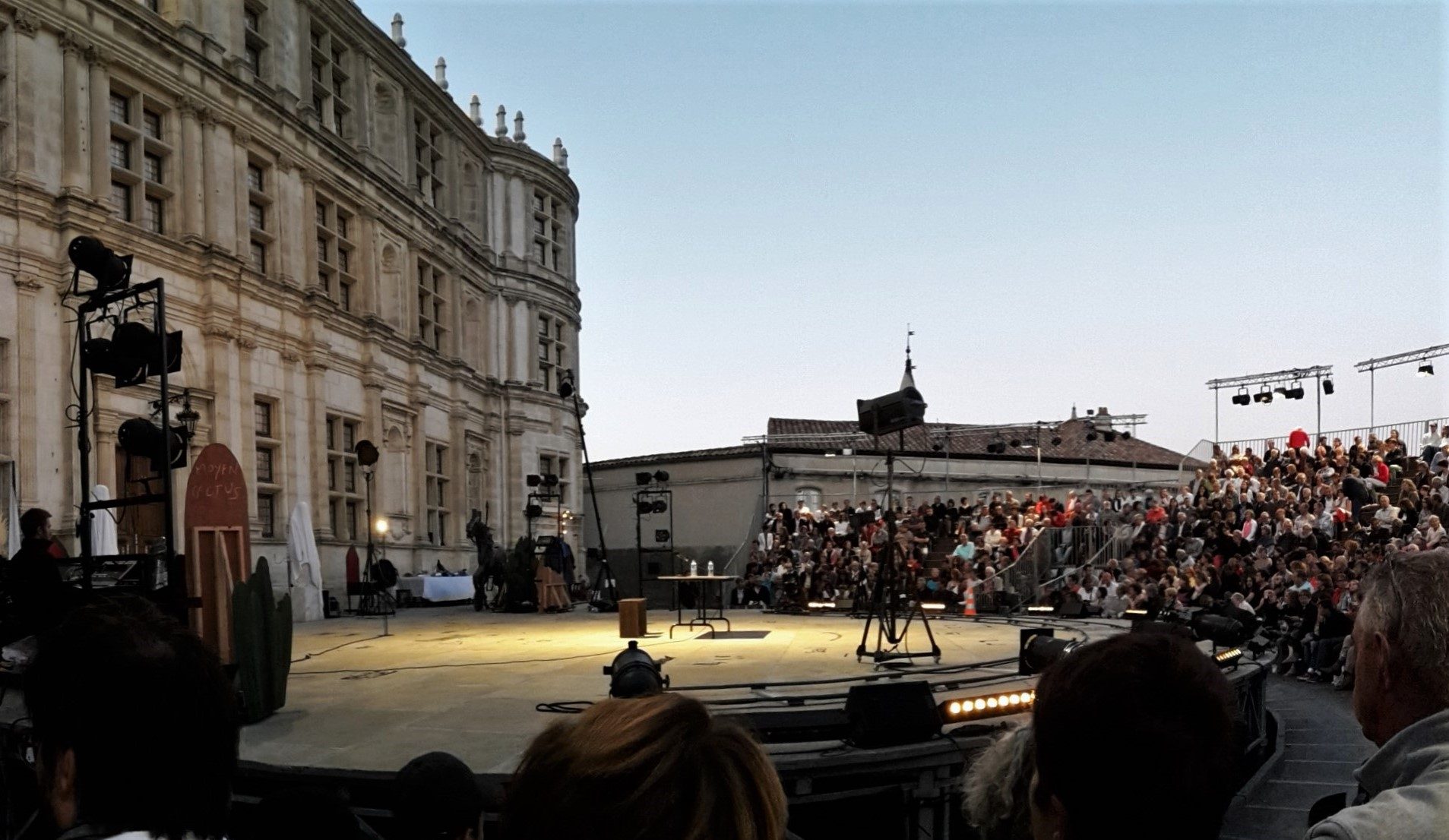 Dispositif scénique mis en place pour la représentation de Don Quichotte dans le cadre des Fêtes nocturnes, devant la façade principale du château de Grignan.